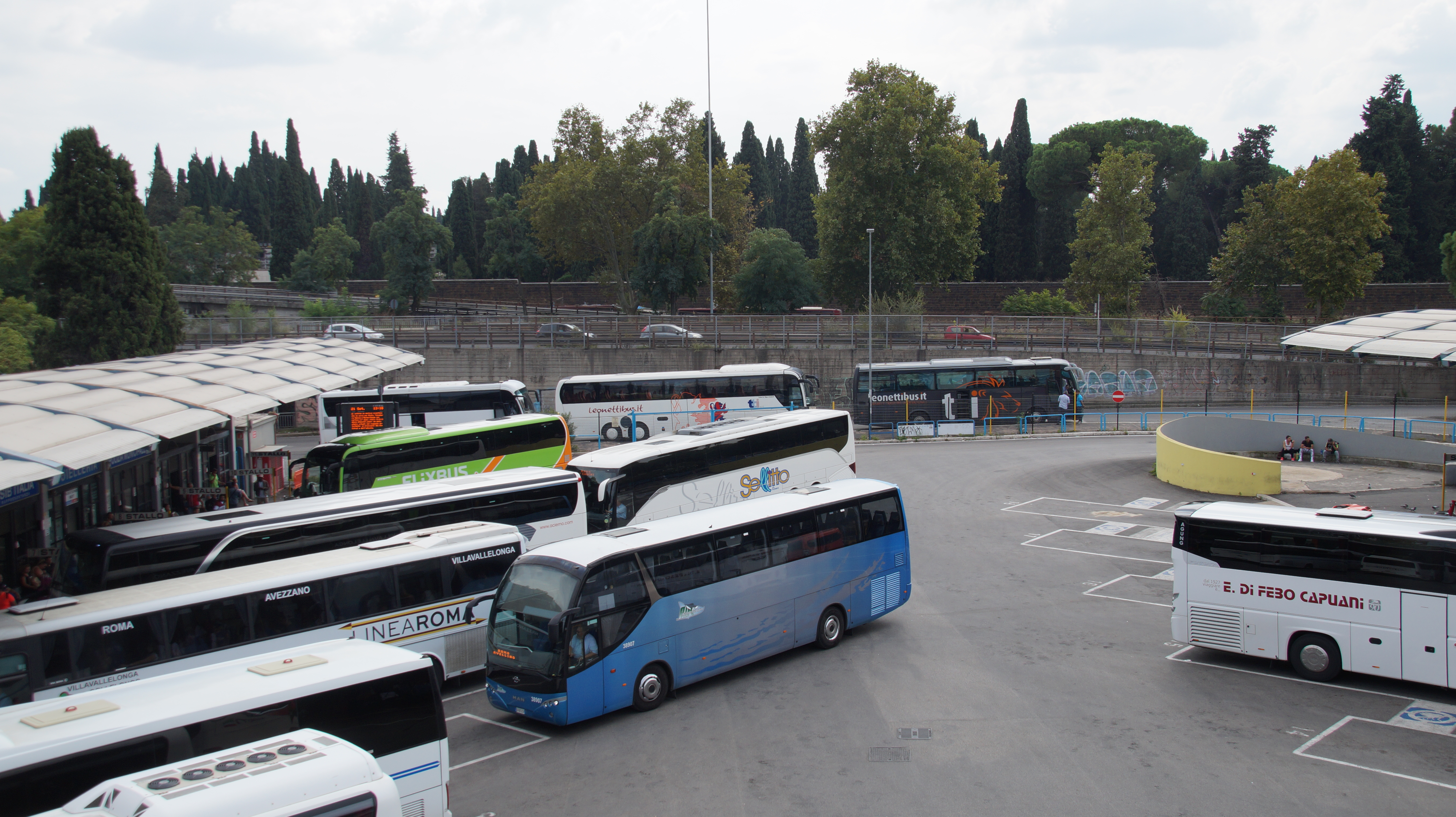 Autostazione Tiburtina